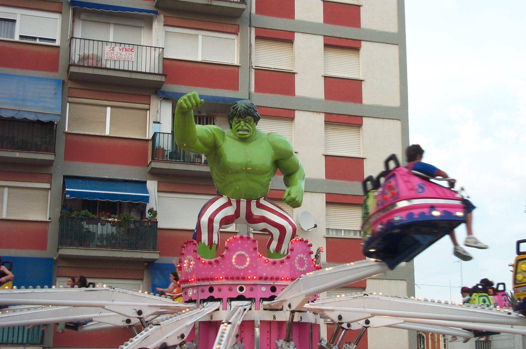 Barrio Juroca en Reus, Tarragona, España/Spain